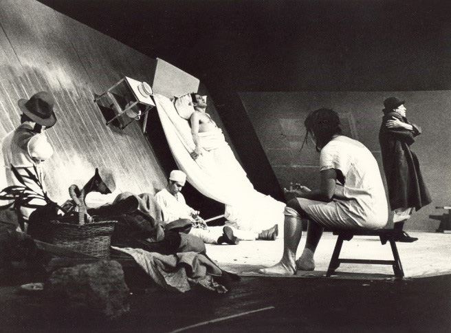 'תפאורת ההצגה 'מאלון הולך למות